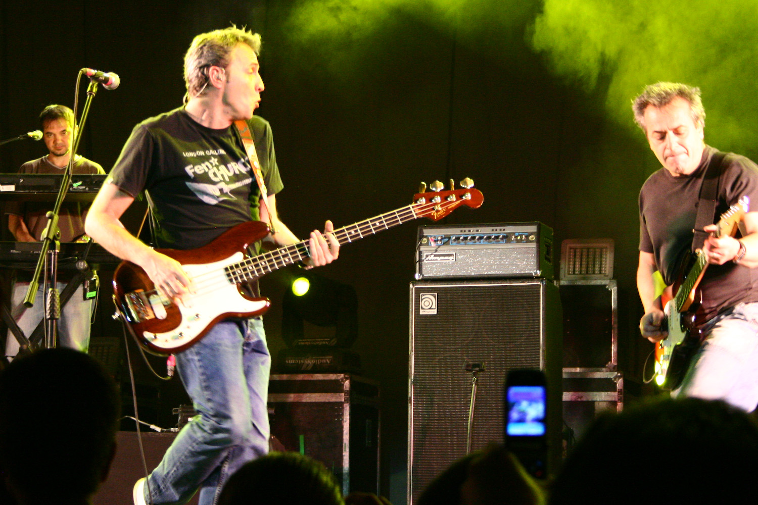 Hombres G es una de las bandas españolas de rock/pop con mayor trascendencia desde su aparición a principios de los años ochenta hasta la actualidad, dadas sus cifras de ventas y la dimensión de su éxito, que abarca tanto España como América además de algunos puntos en Portugal.